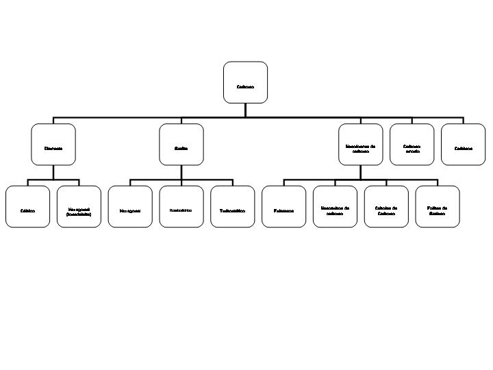 Figura 1. Formas alotrópicas do carbono.